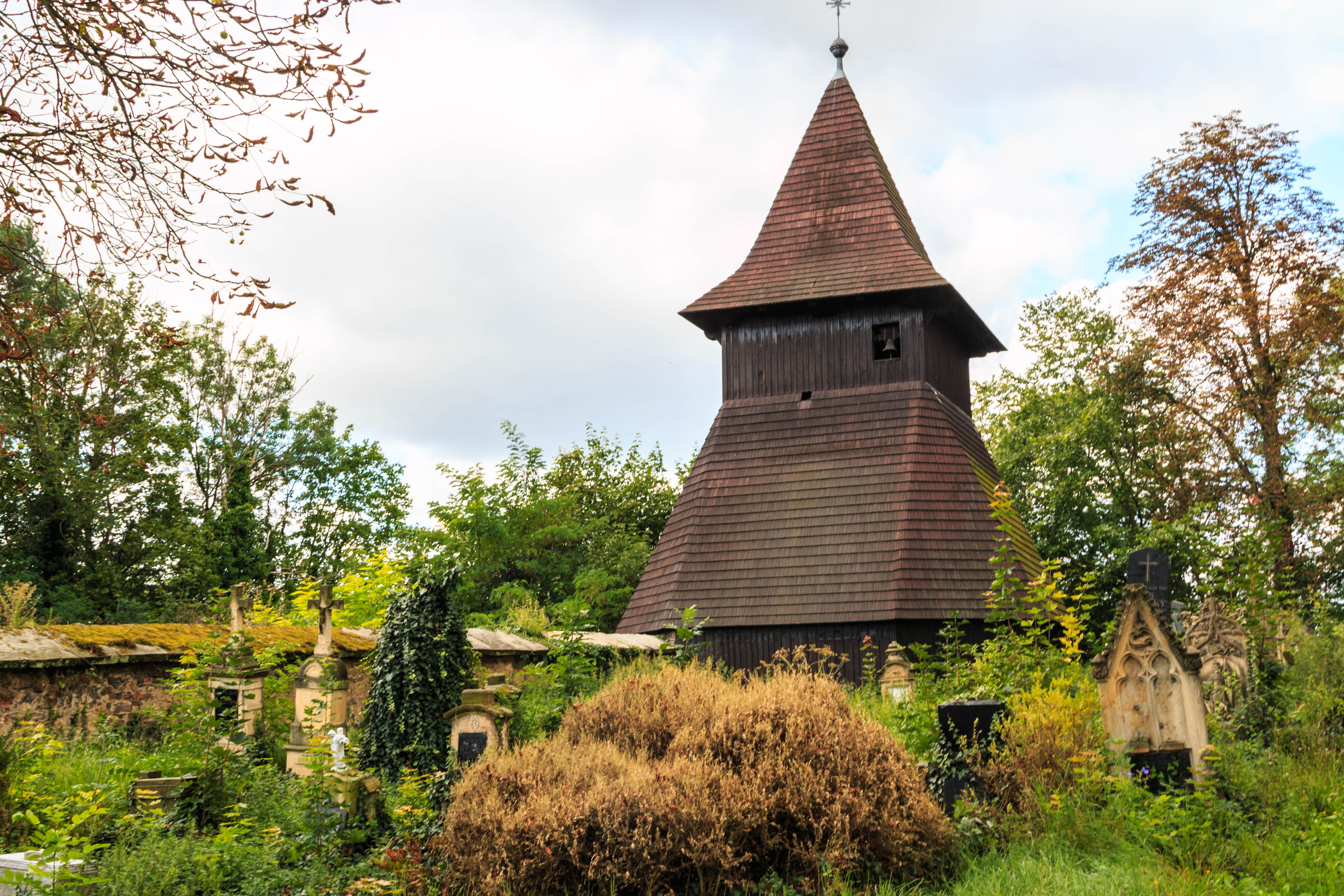 Kostel svatého Václava, Jezbořice.